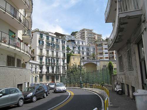 via Tasso. Vomero, Naples, Italy